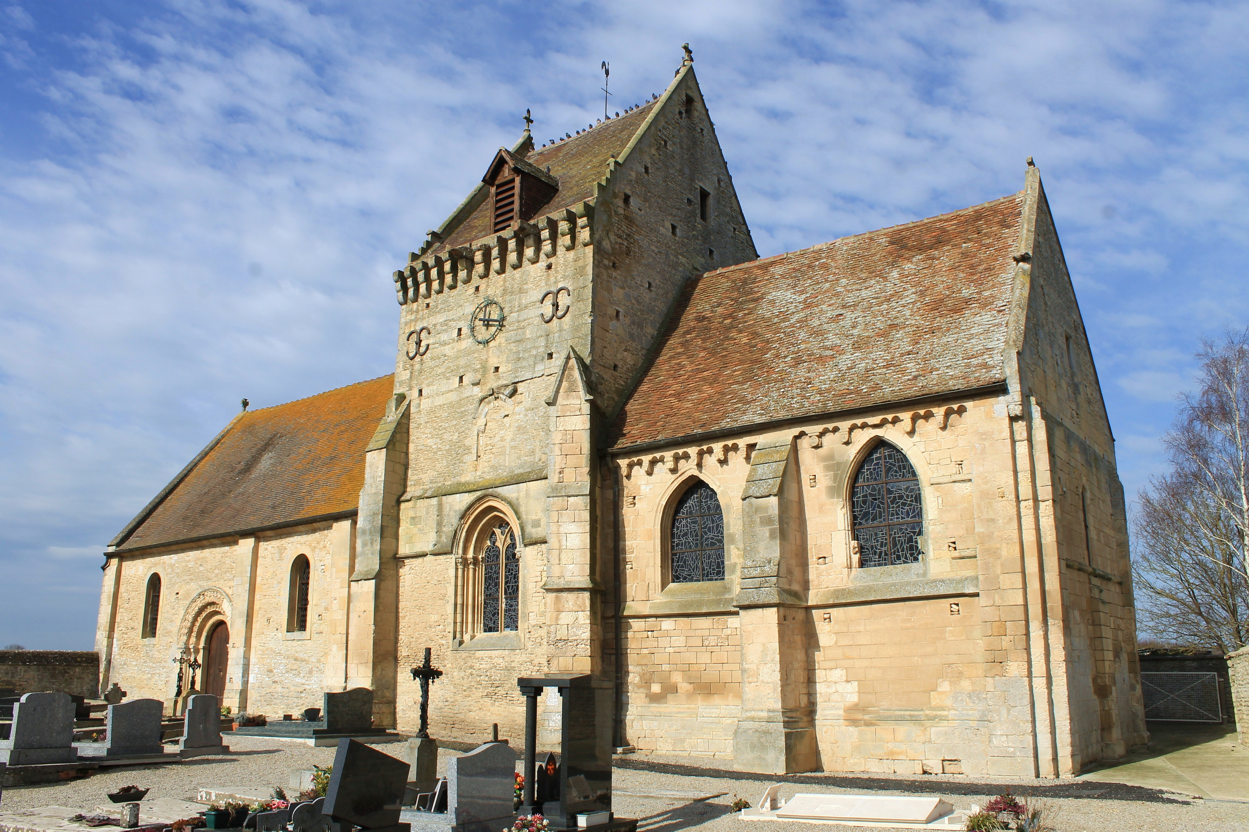 Église Saint-Denis de Soignolles (Calvados)